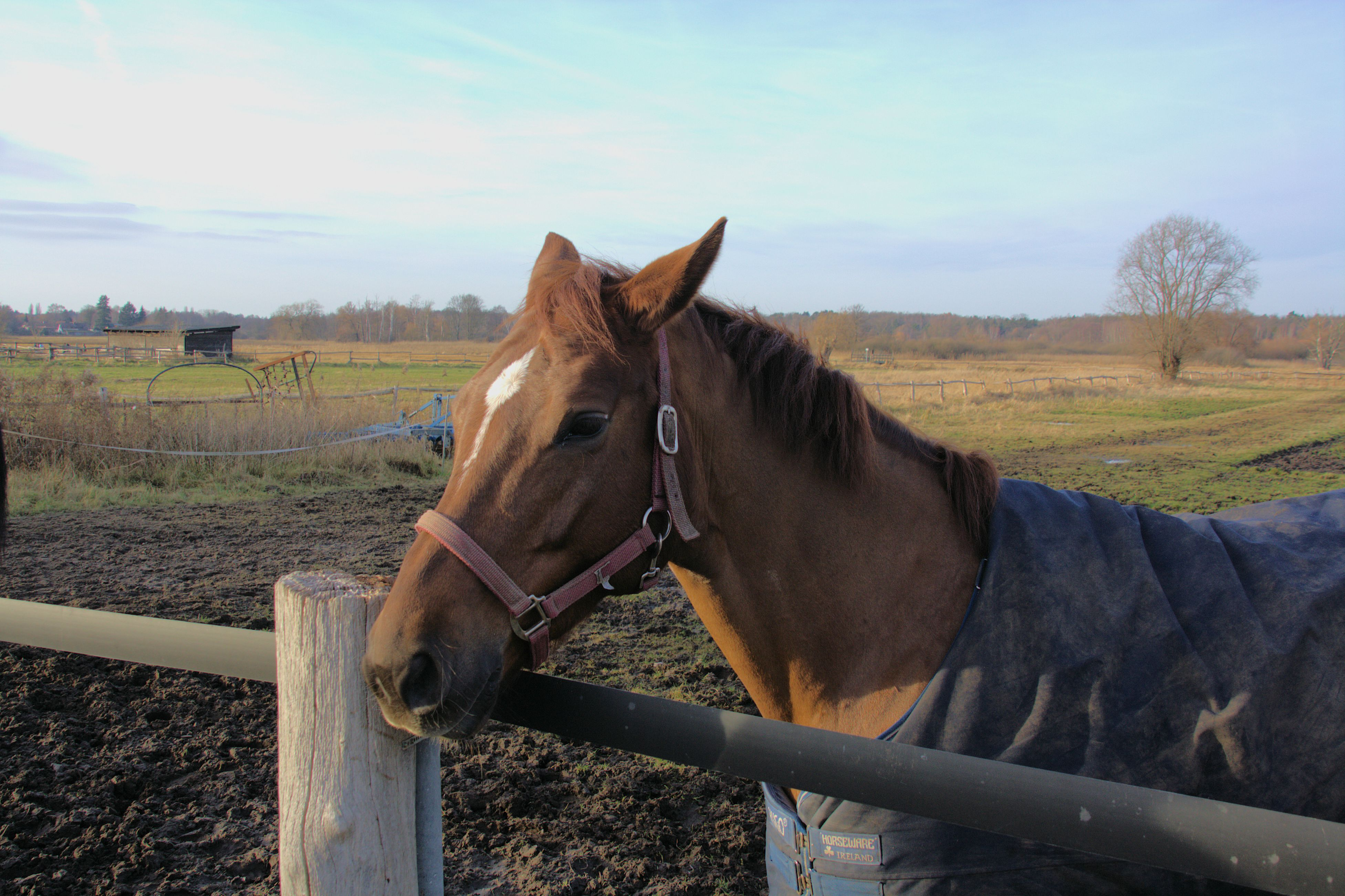 Gestüt in Lübars, Berlin, Deutschland